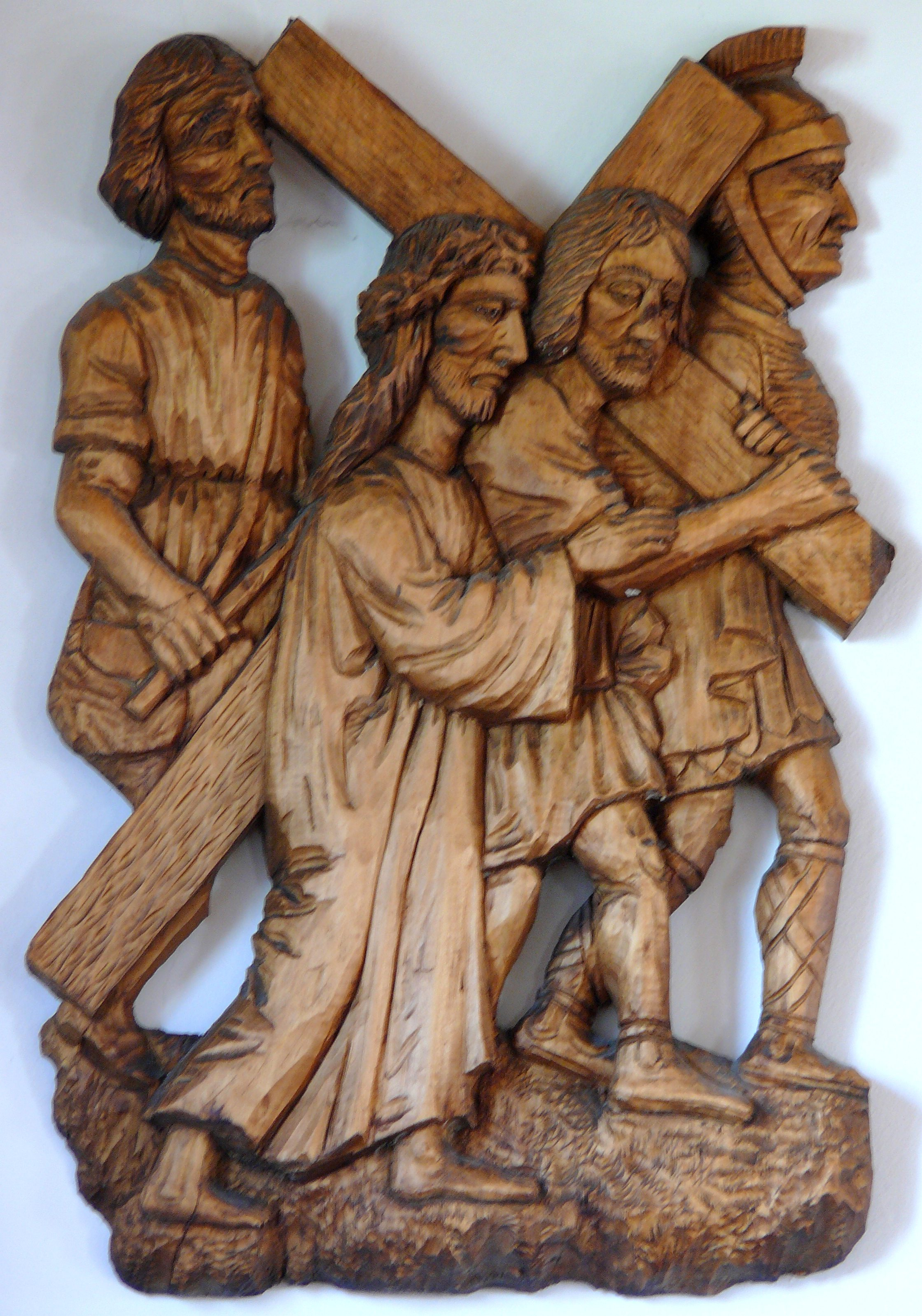 V Szymon Cyrenejczyk pomaga nieść krzyż Jezusowi